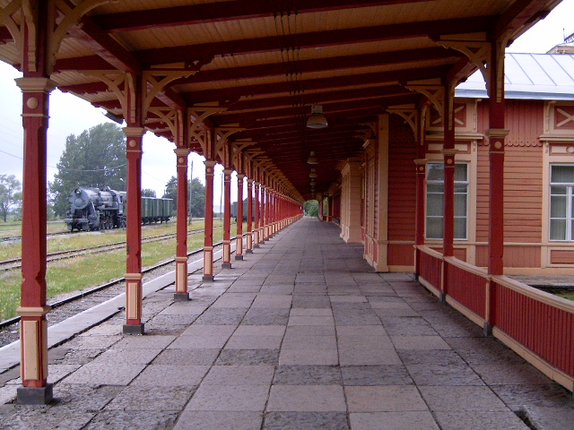 station of Haapsaluu, Estland